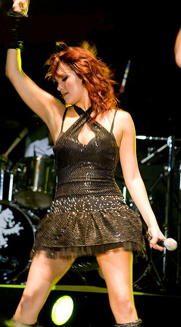 Dulce María em um show em 2008.